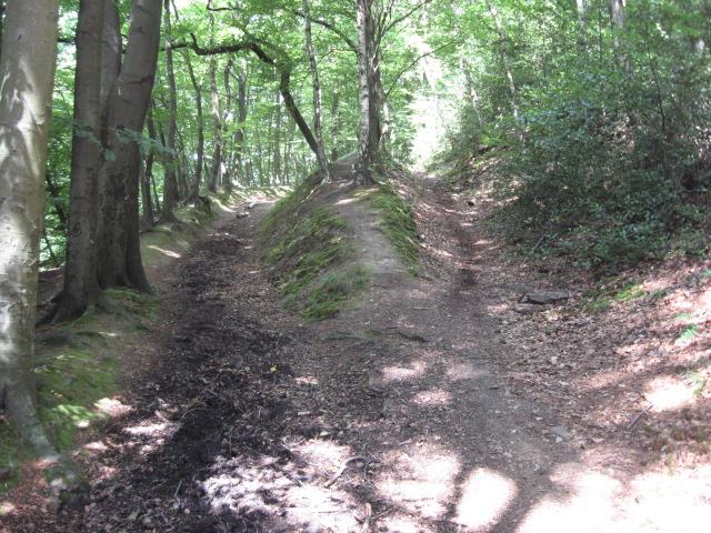 Hohlwege von Schiebekarren der Zeche Carthäuser Loch